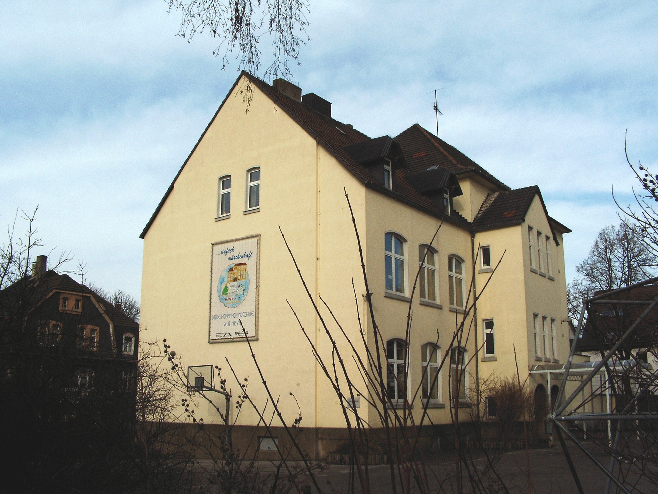 Dortmund-Hombruch: Katholische Brüder-Grimm-Grundschule an der Leostraße